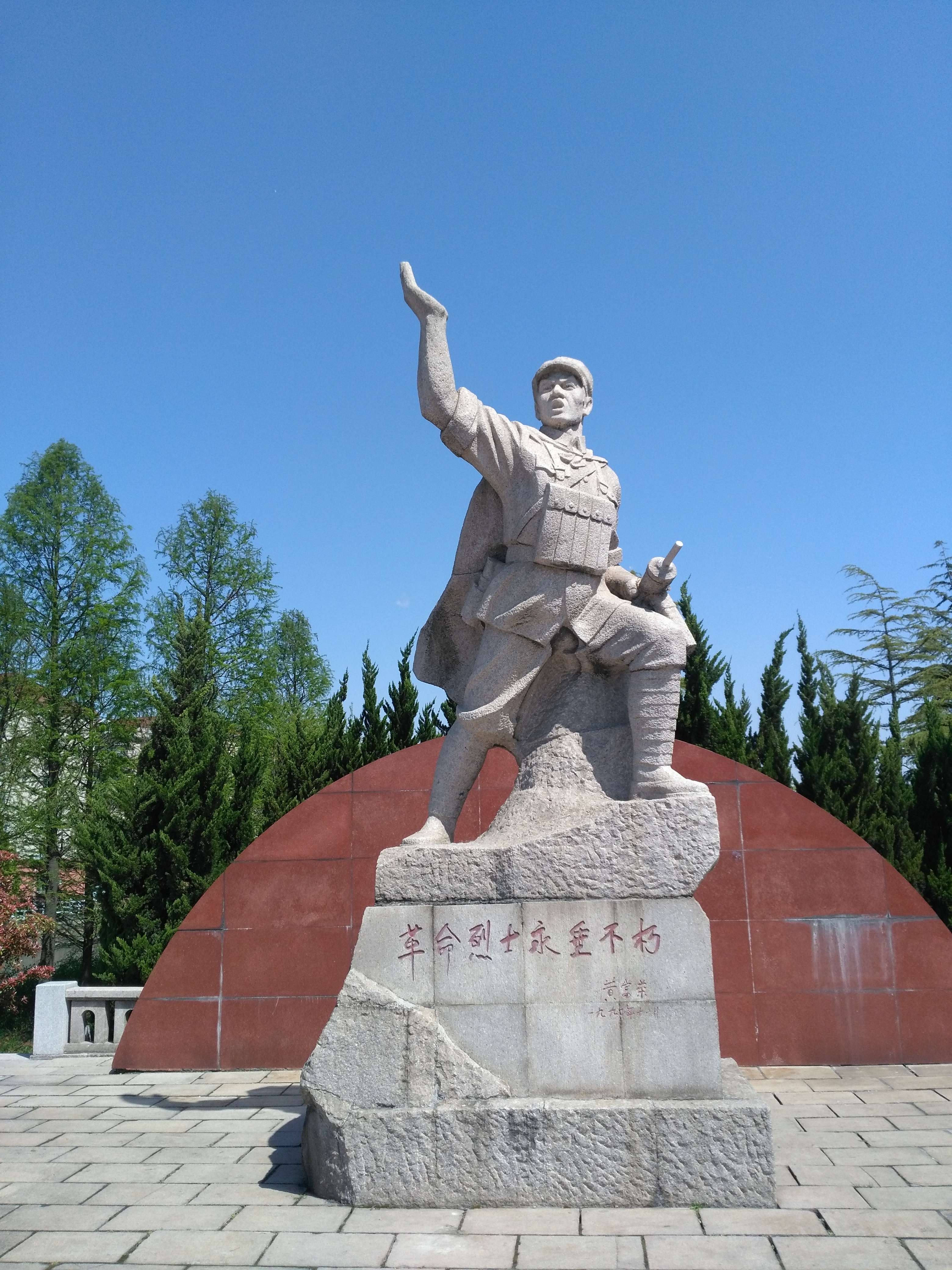 上海油画雕塑研究院所造七号桥战士雕塑